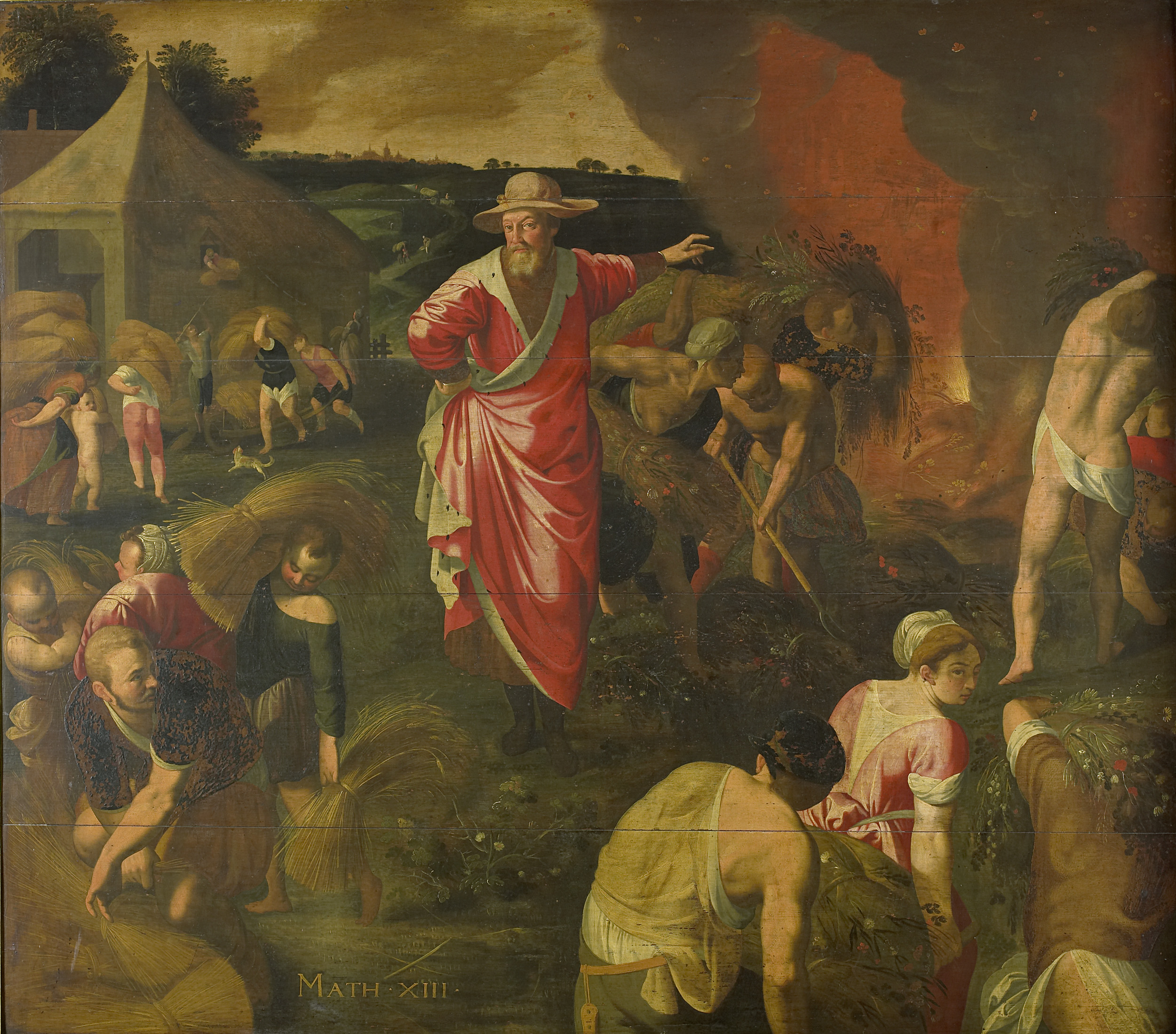 De gelijkenis van het onkruid onder de tarwe (Mattheus XIII). In het midden een staande boer die bij het oogsten de landwerkers met schoven onkruid verwijst naar een brandstapel waar het onkruid verbrandt wordt; de schoven tarwe worden echter verzameld en opgeslagen in een voorraadschuur links.